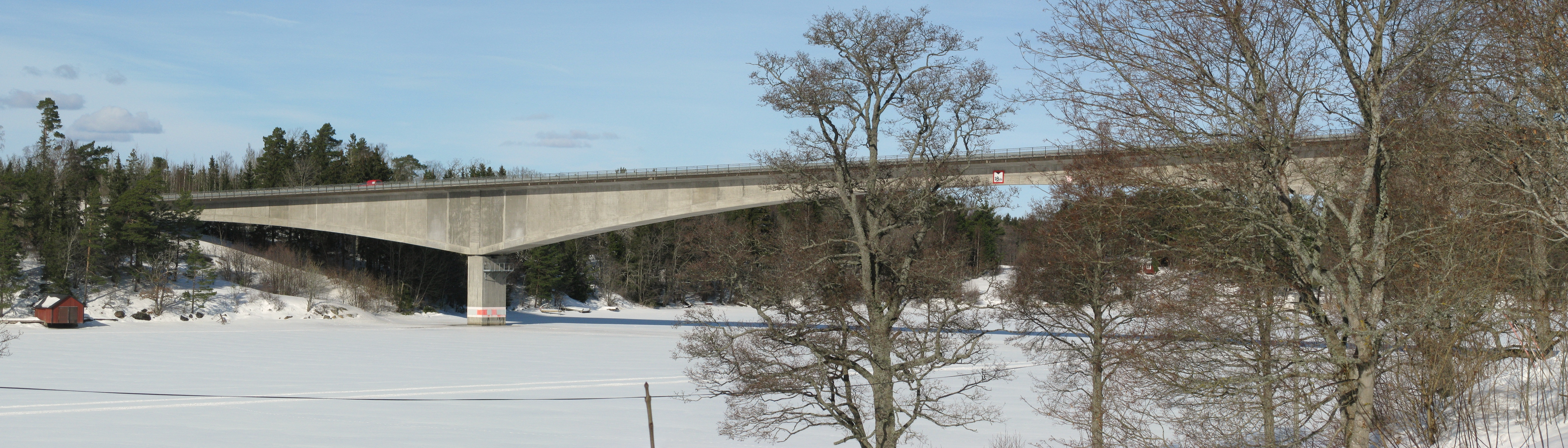 Bron mellan Vätö och fastlandet i Norrtälje kommun. Källa: eget foto, fotograf EnDumEn, 9 mars 2010.